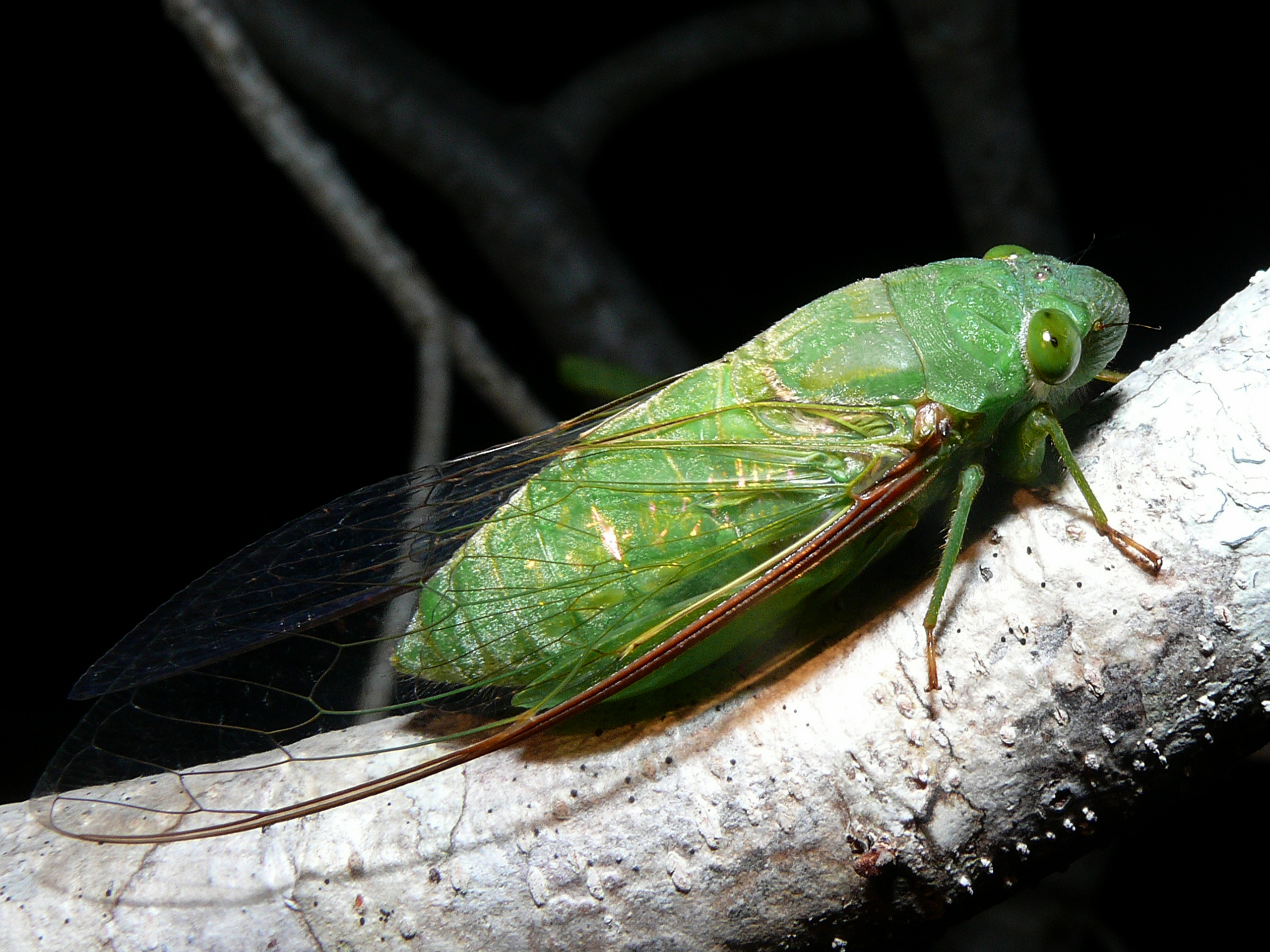 Similajau NP, Sarawak, MALAYSIA